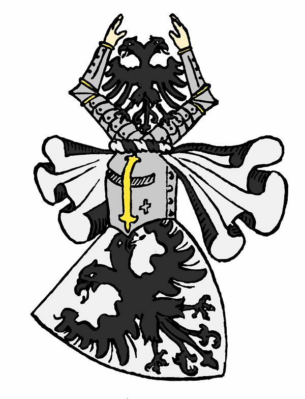 Wappen der von Below, Mecklenburg